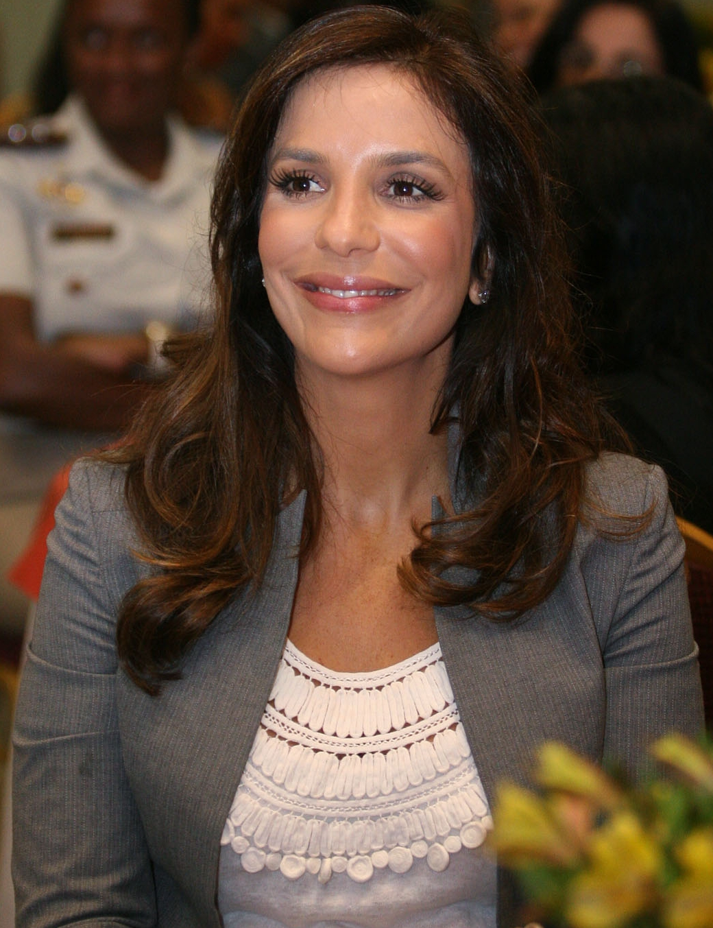 Academia da Polícia Civil homenageia as mulheres. Na foto: Ivete Sangalo.